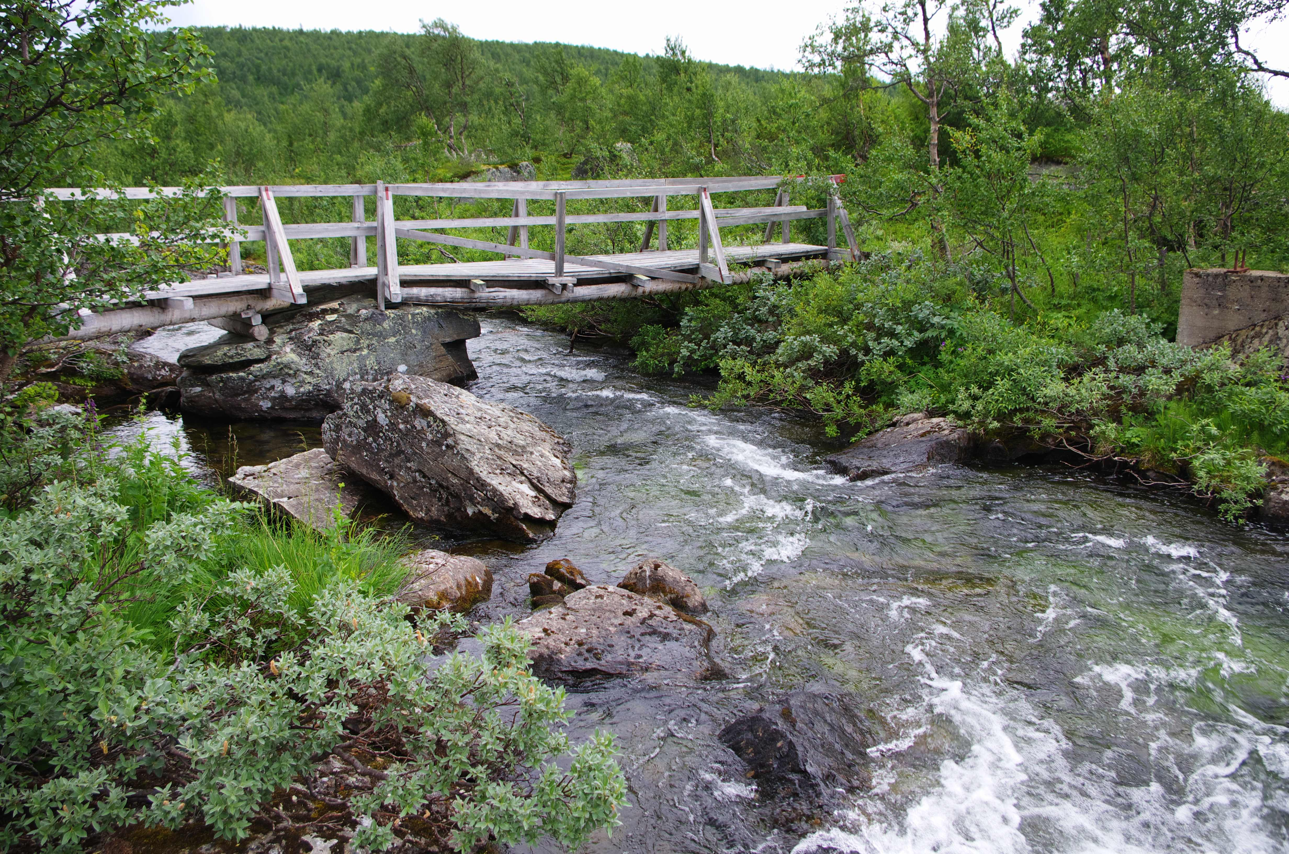 Sjön Lutaure (Luvtávrre) i Pieljekaise nationalpark i Arjeplogs kommun i Lappalnd, Sverige.